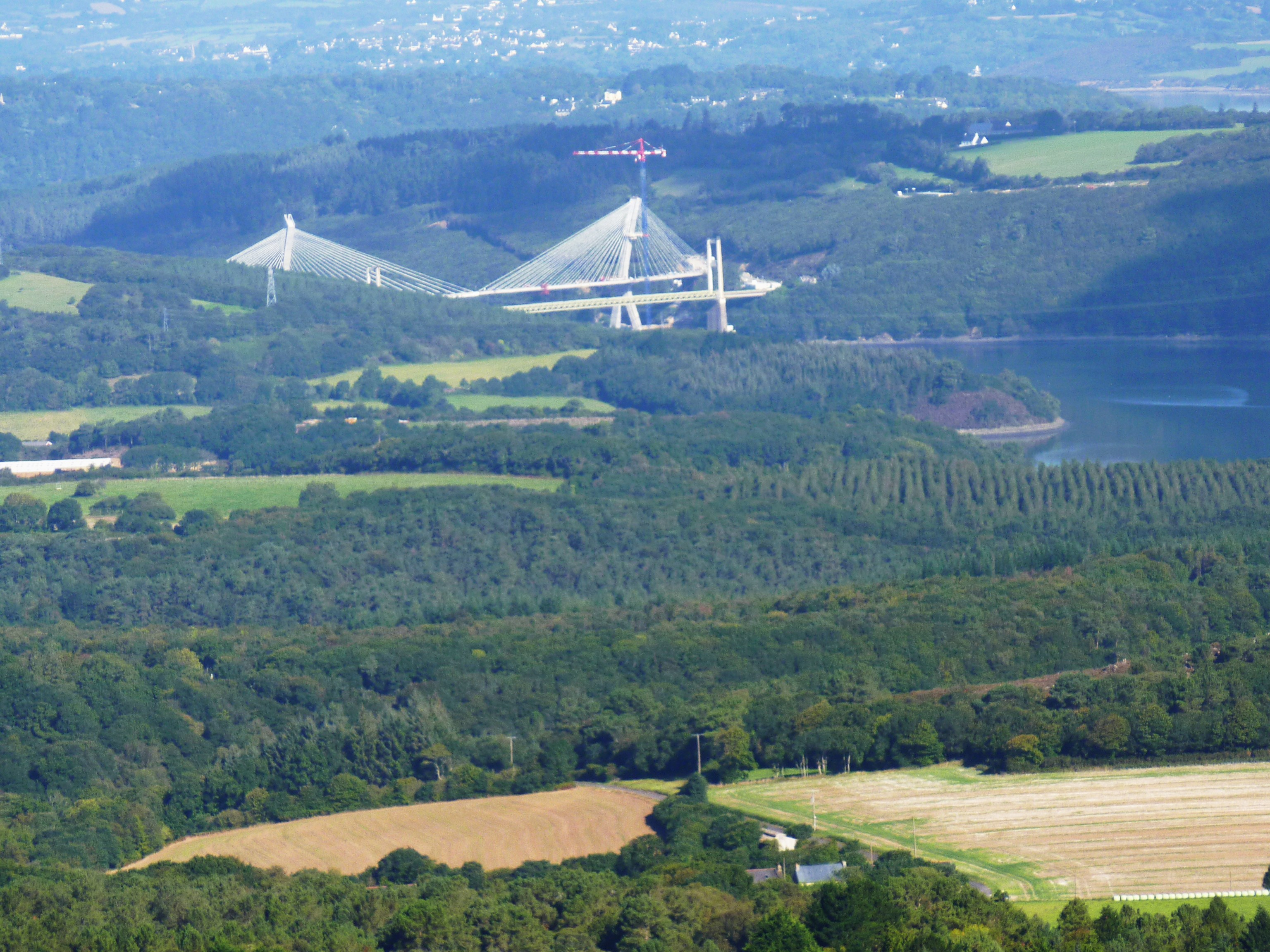 L'Aulne maritime et le nouveau Pont de Térénez vus du sommet du Menez-Hom